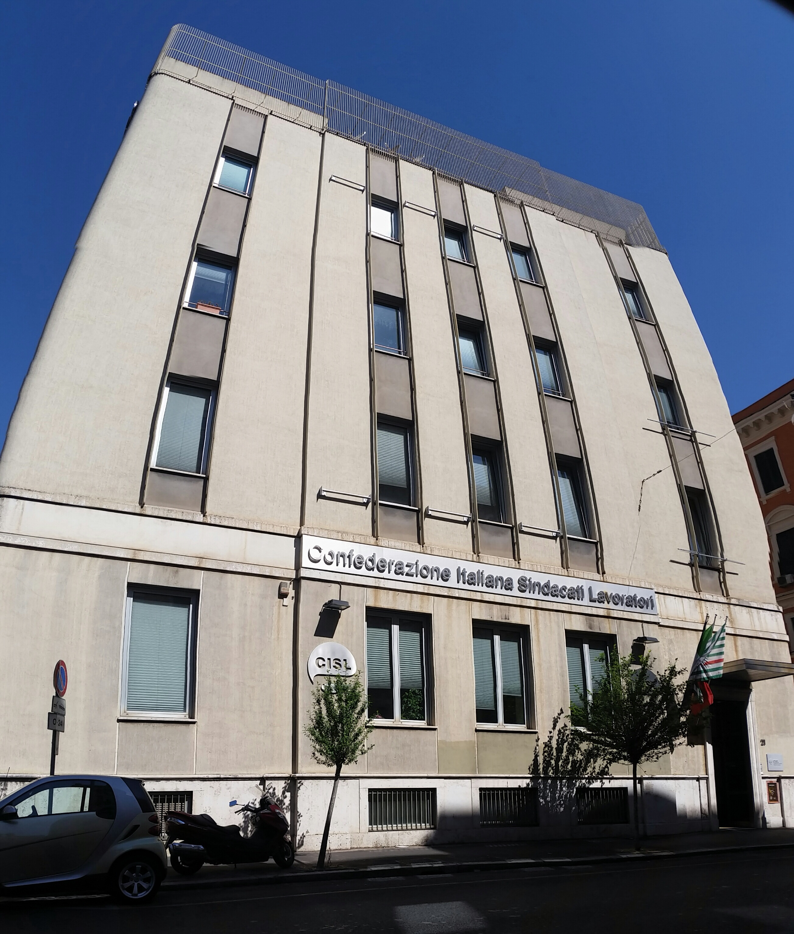 Sede centrale CISL a Roma.